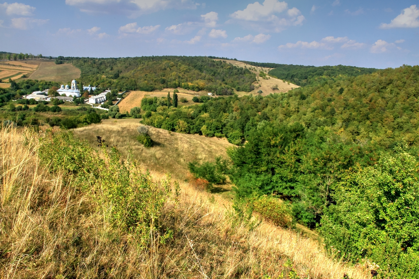 Добруша, монумент природы, находится в Шолдэнештский район,Между с. Олишкань и р. Чорна, Олишканское лесничество, урочище Олишкань-Присака, кварталы 22, 23; урочище Добруша, кварталы 14-17, выделы 1-11, 13-26; кварталы 18-21, 24-37, 40- 44, выделы 1-16; квартал 45, выделы 1-6; кварталы 46-57, выделы 1-11; квартал 58, выделы 1-20; кварталы 59-68, 70, 71 (код MD-SD-rp-039)